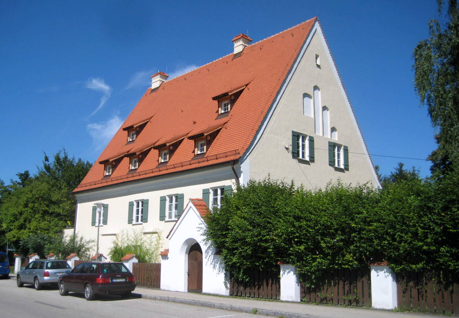 Münchsmünster ist eine Gemeinde des LKr. Pfaffenhofen a.d. Ilm.